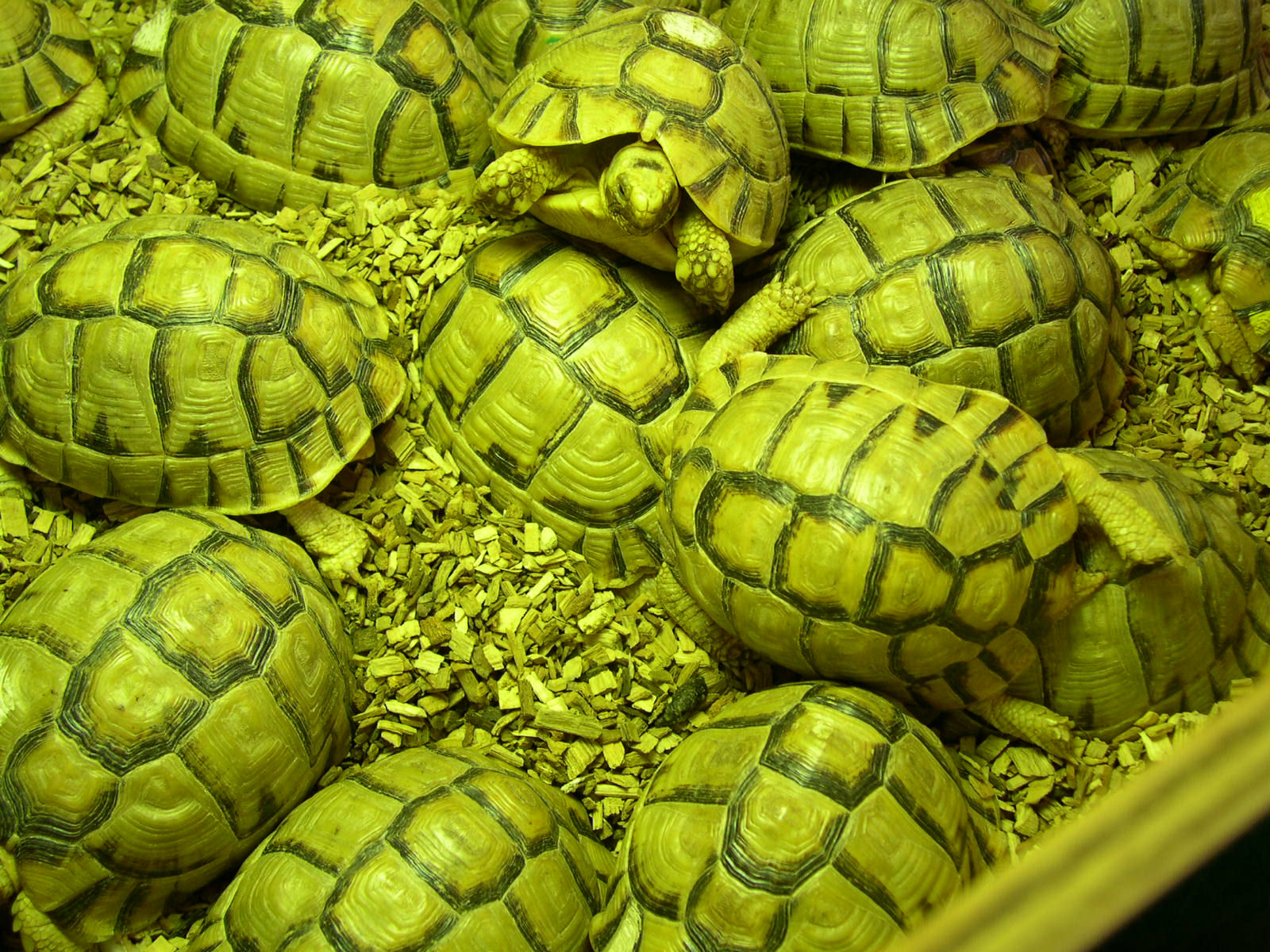 Da sequestro effettuato dal Corpo Forestale dello Stato nel 2006, su una nave cargo attraccata al Porto di Genova e proveniente dall'Africa mediterranea, momentaneamente affidate alle cure dei guardiani del rettilario del Bioparco di Roma